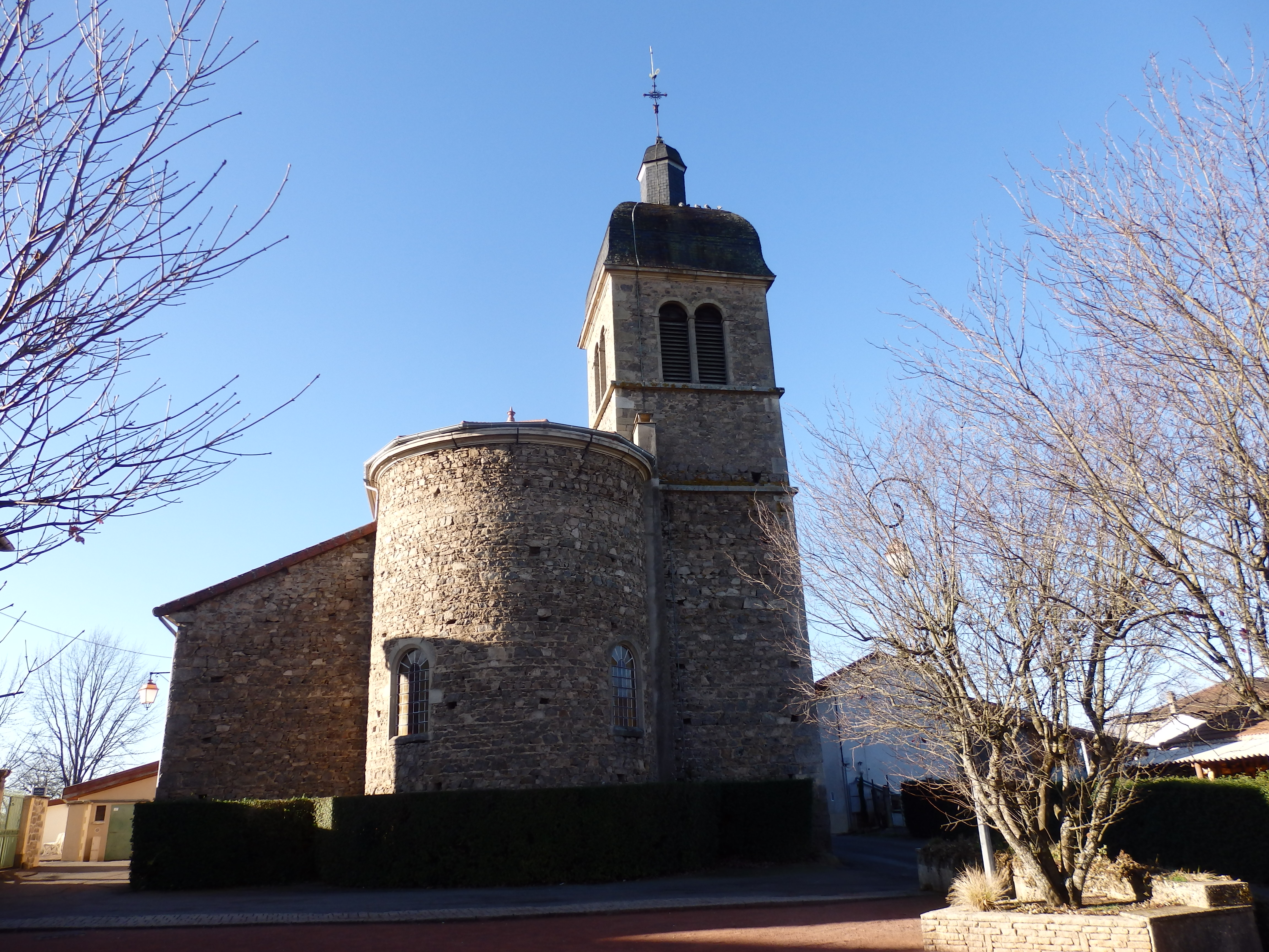 Vue extérieure sur l'arrière de l'église avec son choeur son cloché